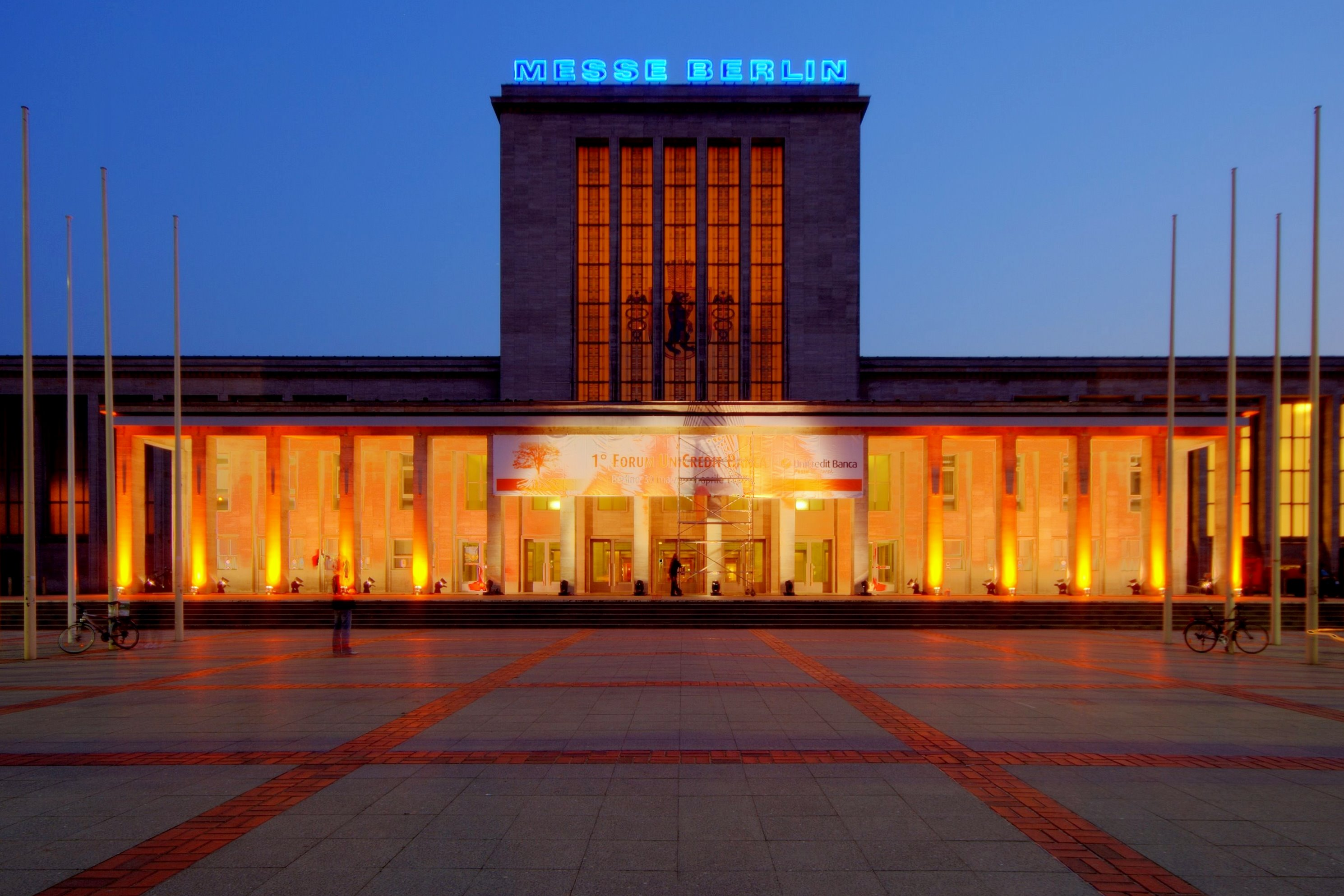 Messe berlin II